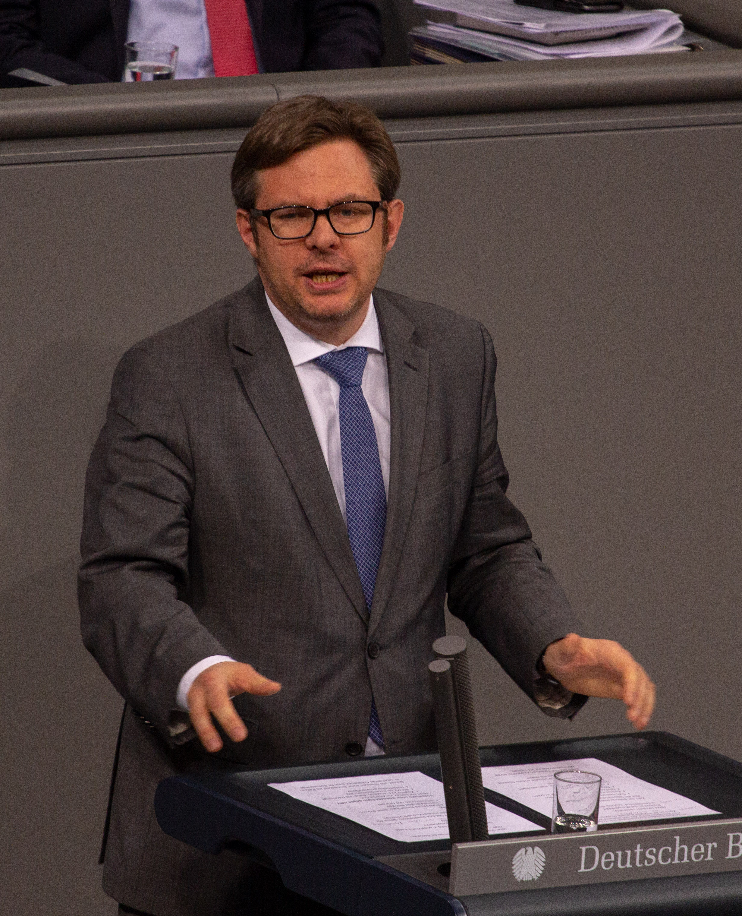 Martin Rosemann, Mitglied des Deutschen Bundestages, während einer Plenarsitzung am 11. April 2019 in Berlin.